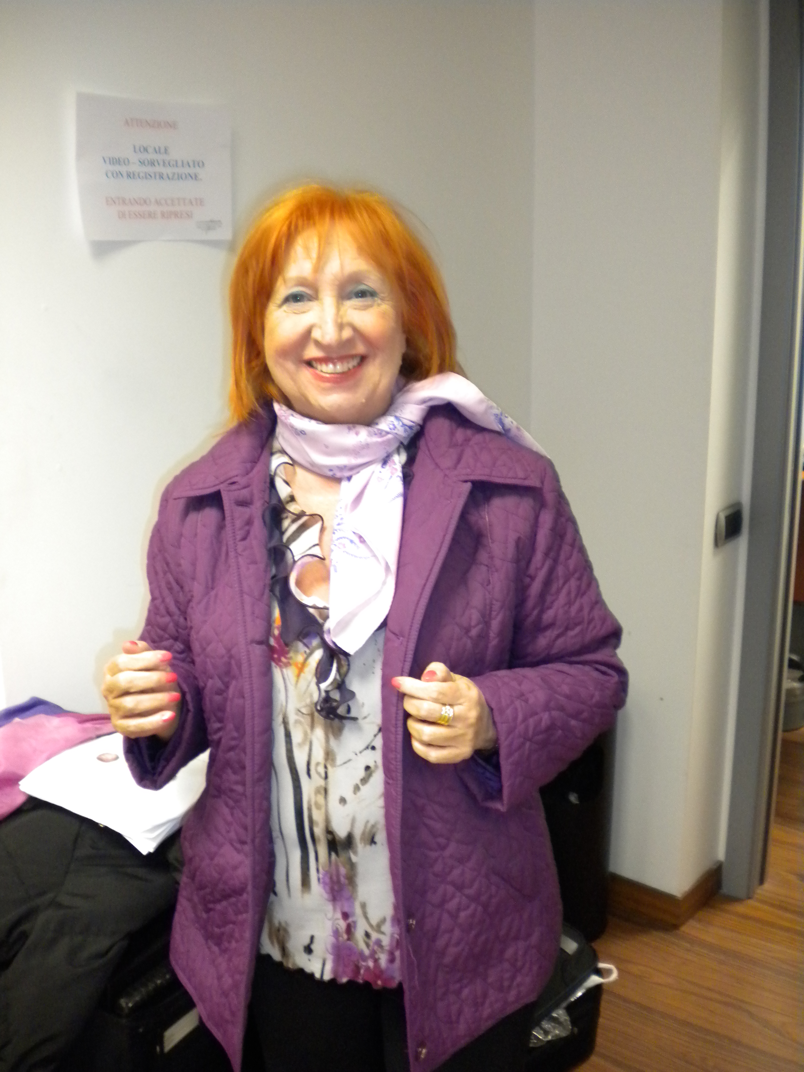 Margherita Fumero durante una pausa sul set